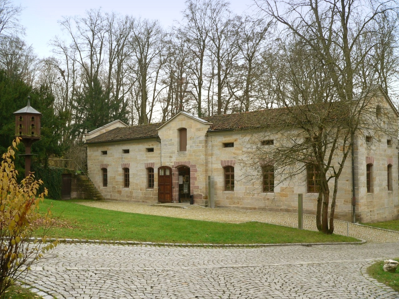 Museumsshop Schloss Rosenau (Coburg)